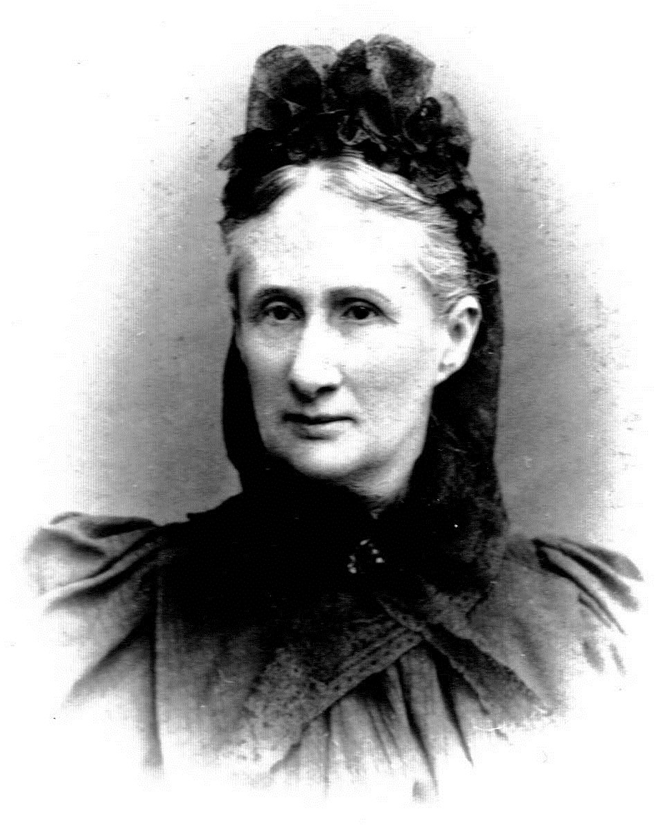 Эмилия Кожуховская, жена Арцимовича Адама Антоновича